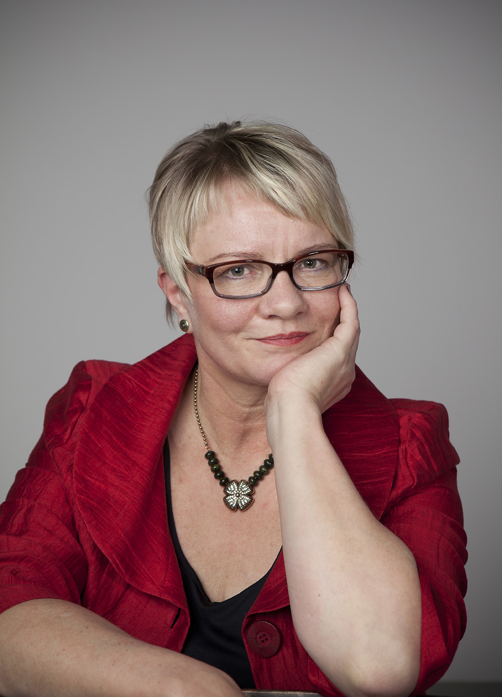 Kiasman johtaja Pirkko Siitari